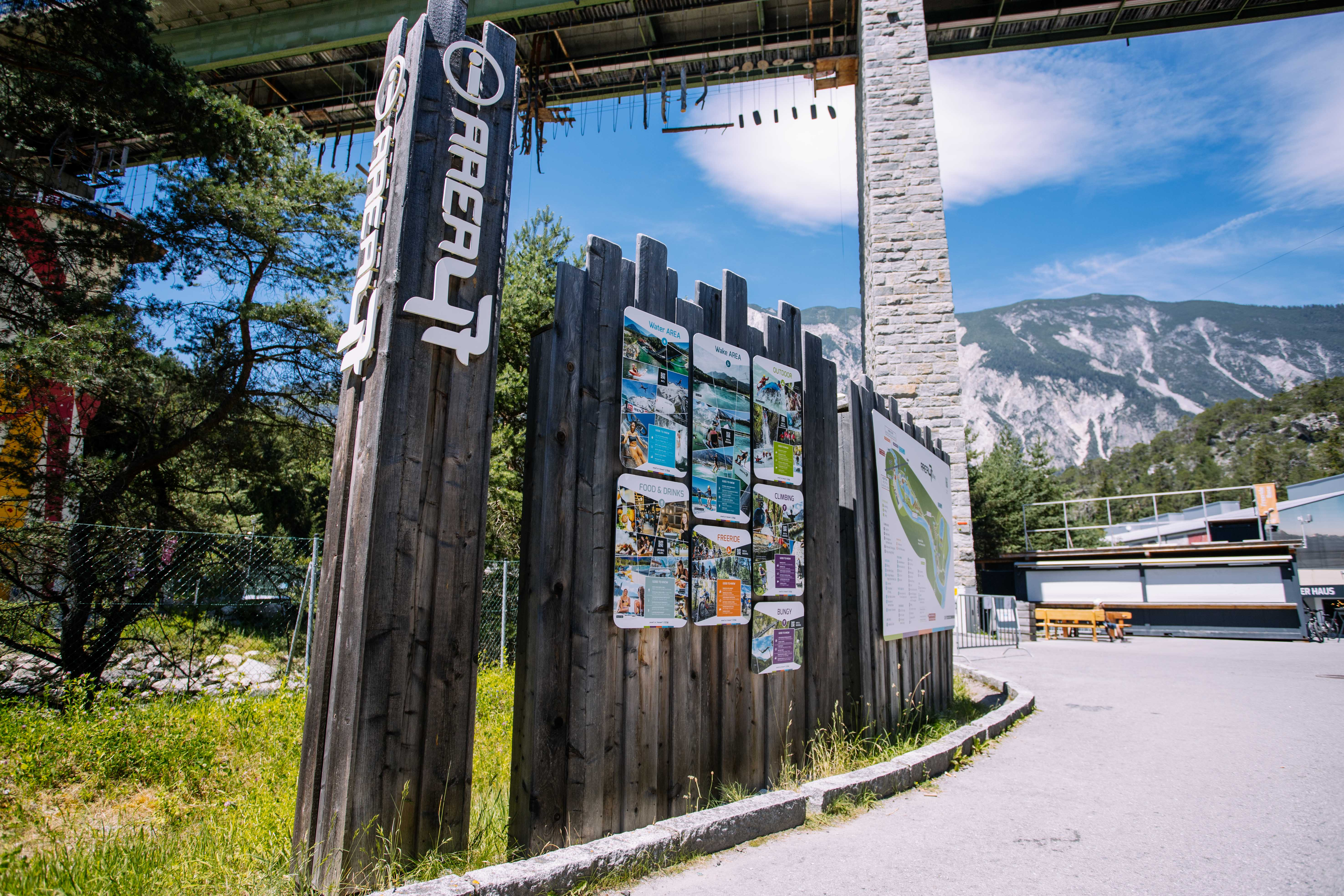 Informationspunkt mit Übersichtskarte und Angebot